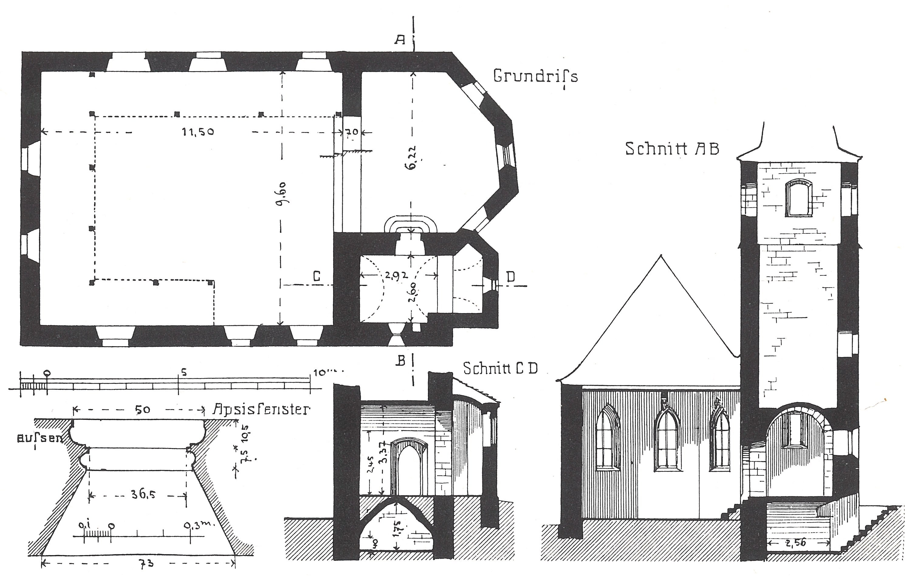 Karlinger, Hans: Die Kunstdenkmäler. S. 15.